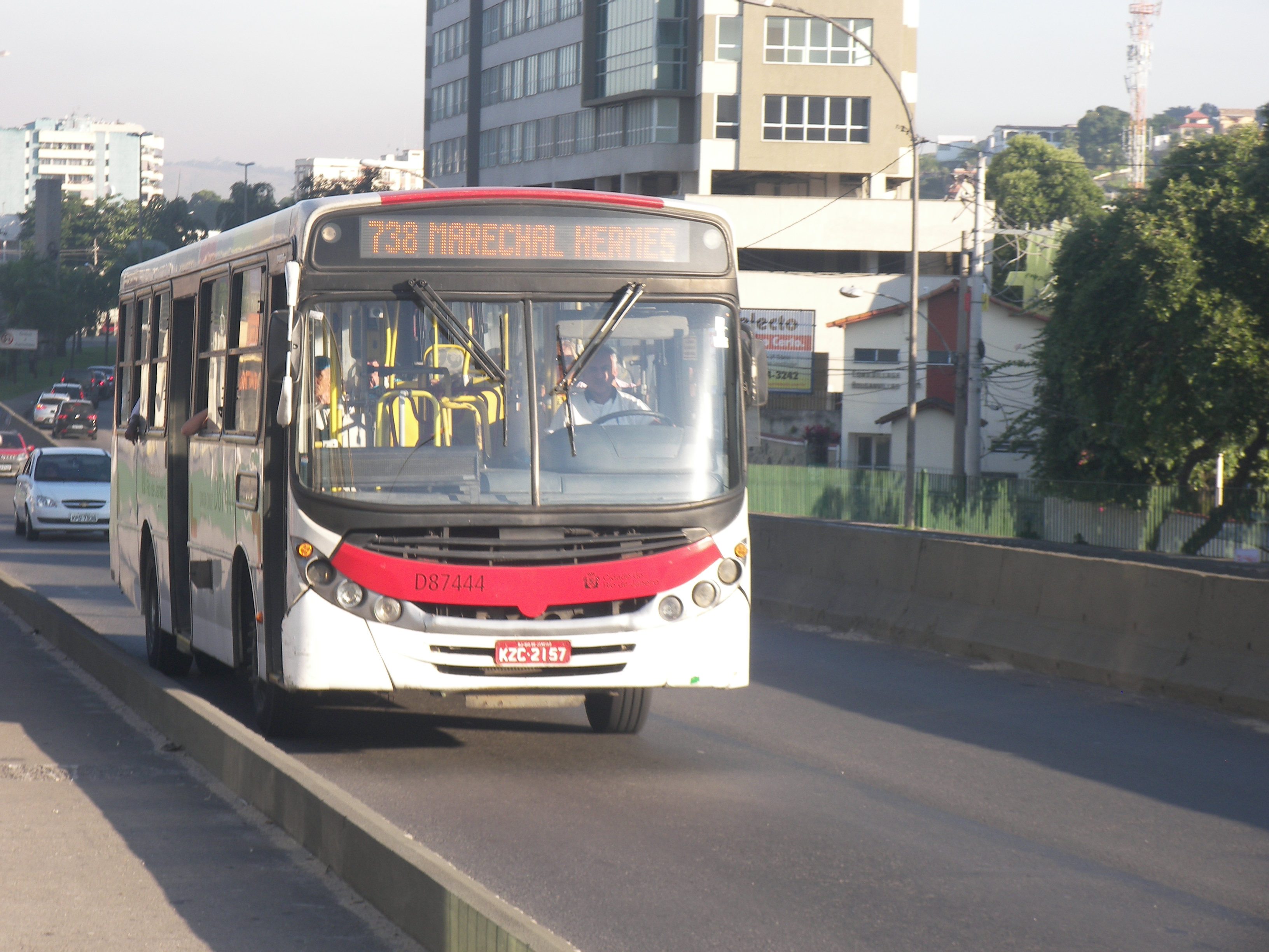 CAIO Apache Vip II da Expresso Pégaso operando linha de ônibus 738 - Marechal Hermes / Urucânia.